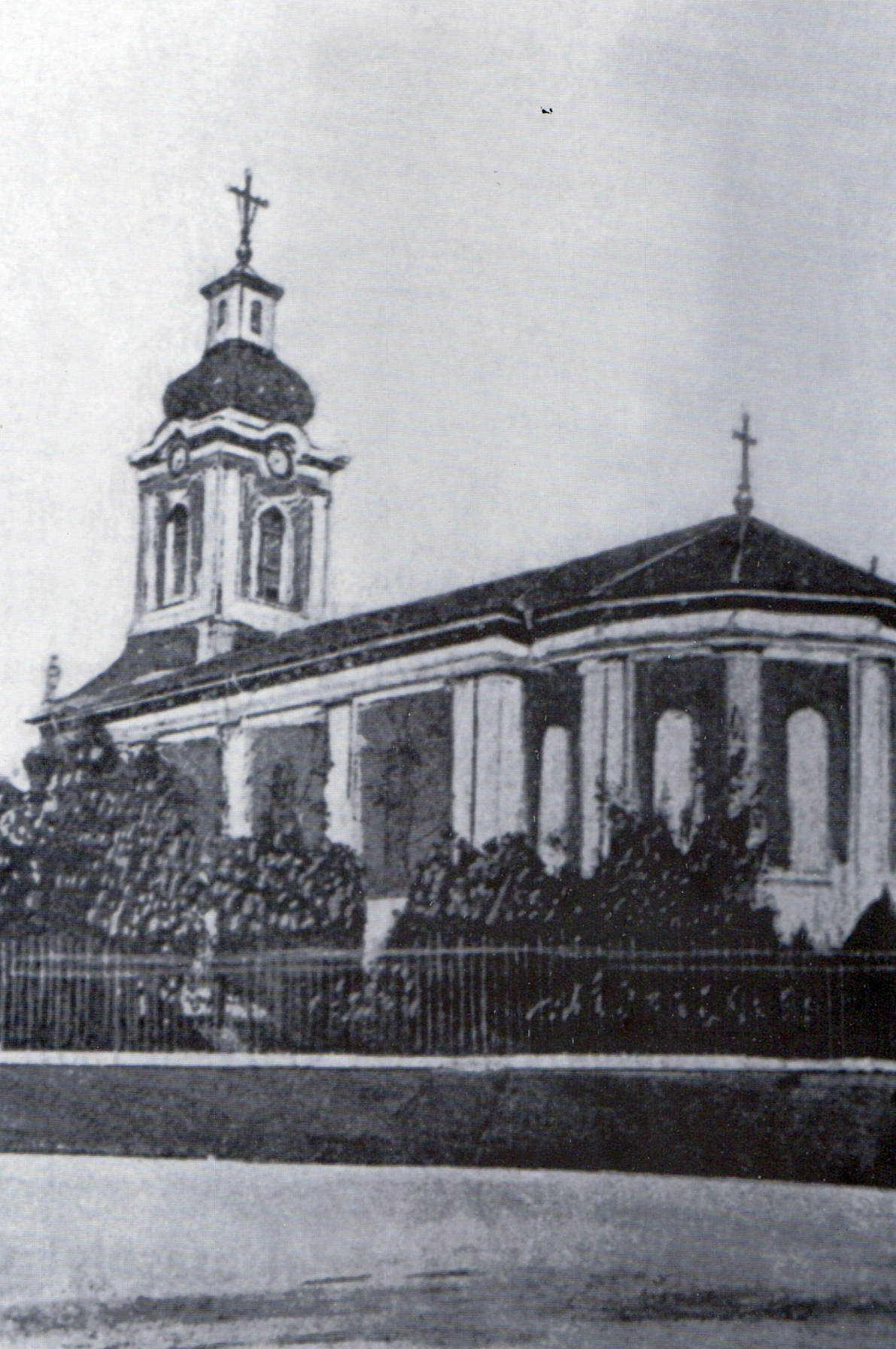 Biserica Madona Dudu din Craiova demolată în anul 1913